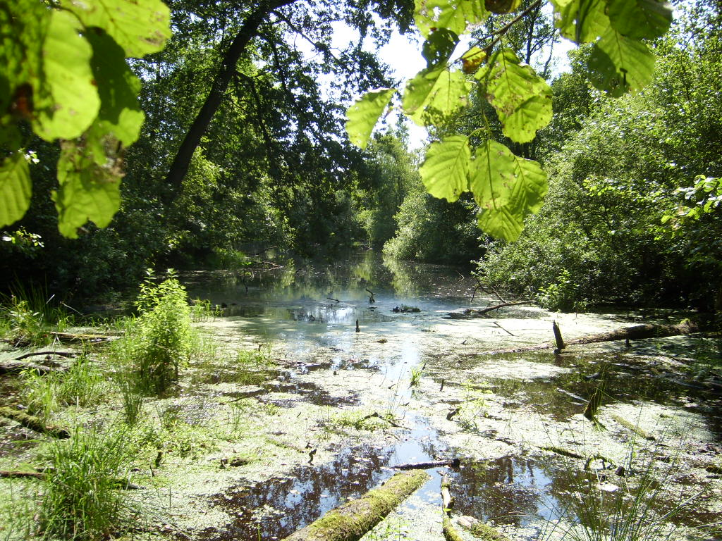 Das Große Depenmoor im Lauerholz in Lübeck